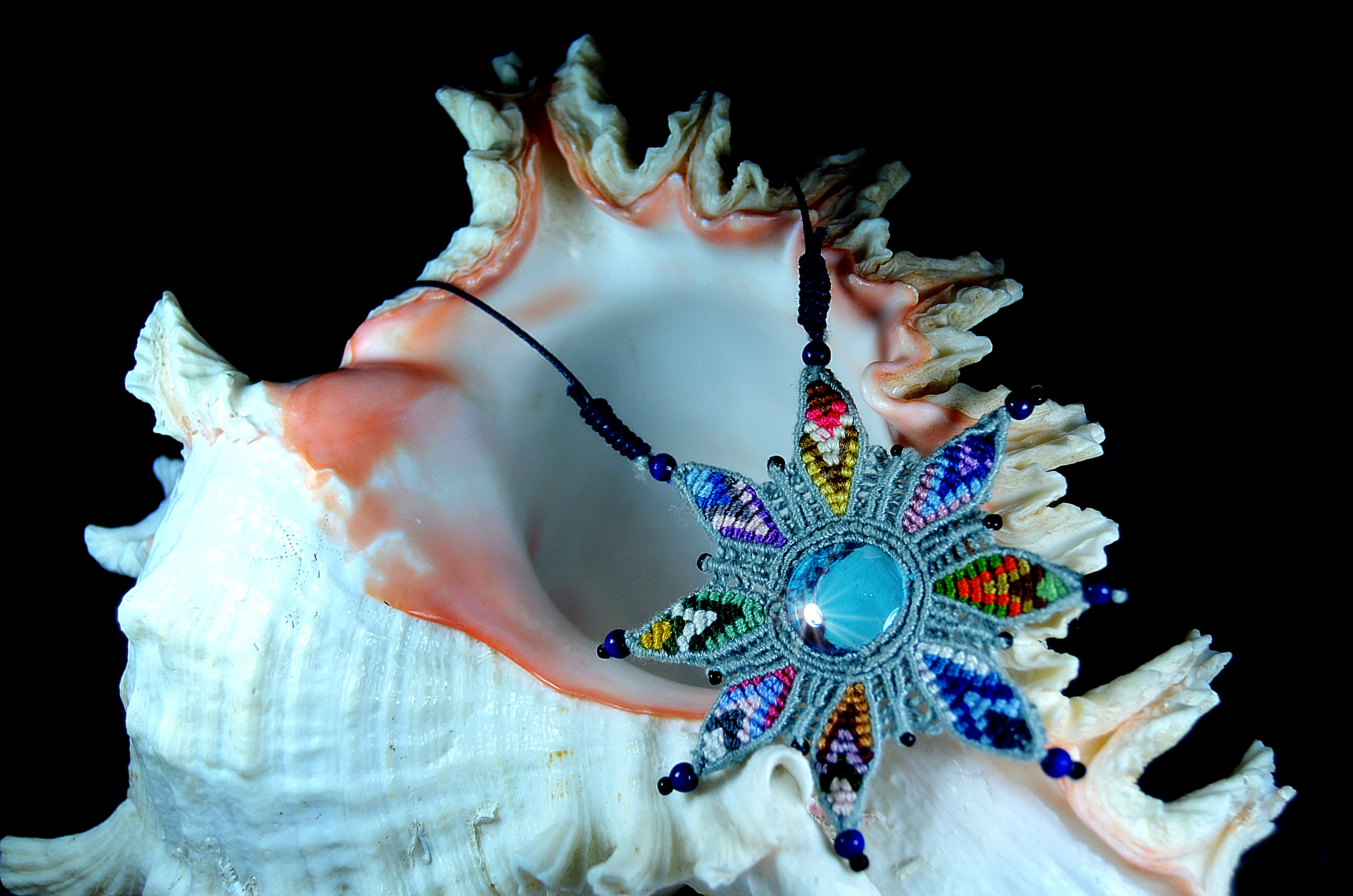 estrella en macramé con hilos multicolor y centro de cristal